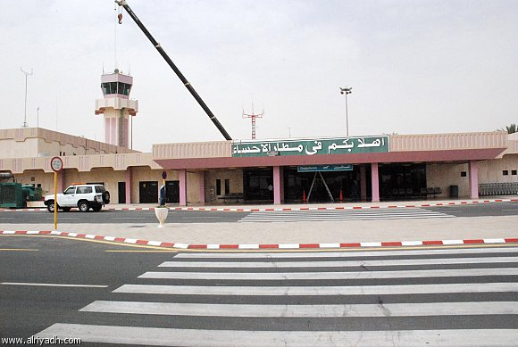 مطار الأحساء الدولي